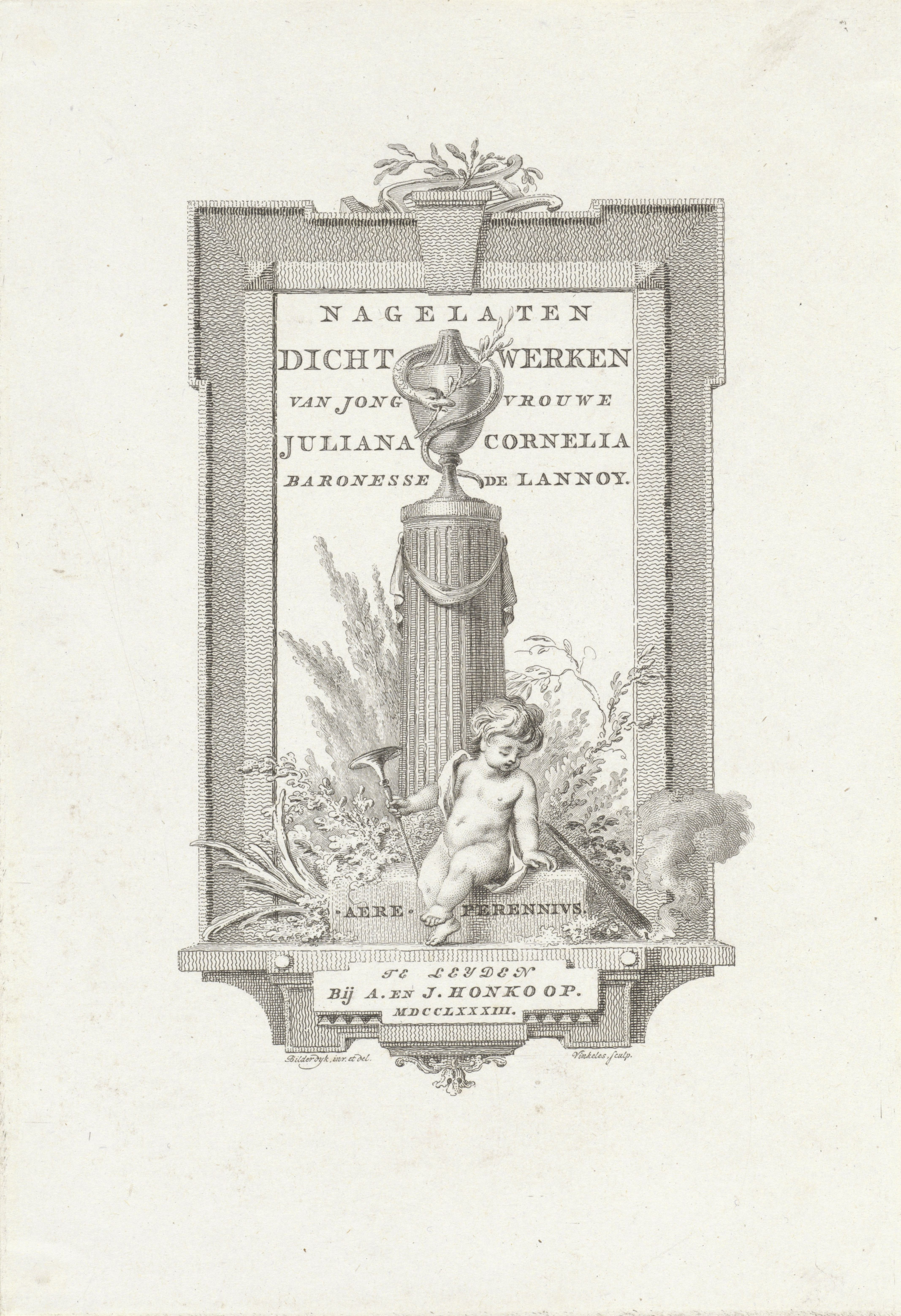 IdentificatieTitel(s): Titelpagina voor: Juliana Cornelia Baronesse de Lannoy, 'Nagelaten dichtwerken' 1783Objecttype: prent titelpagina Objectnummer: RP-P-OB-65.794Opschriften / Merken: verzamelaarsmerk, verso, gestempeld: Lugt 240Omschrijving: Titelpagina voor 'Nagelaten dichtwerken' van Juliana Cornelia Baronesse de Lannoy, met een putto met een bazuin en een gedoofde kaars. Achter de putto een zuil Waar: op een Wie: rookvat met een slang.VervaardigingVervaardiger: prentmaker: Reinier Vinkeles (I) (vermeld op object)naar tekening van: Bilderdijk (vermeld op object)uitgever: Jan Honkoop (vermeld op object)Plaats vervaardiging: prentmaker: Amsterdamuitgever: LeidenDatering: 1783Fysieke kenmerken: ets en gravureMateriaal: papier Techniek: etsen / graveren (drukprocedé)Afmetingen: blad: h 234 mm × b 161 mmToelichtingTitelpagina voor: Lannoy, Juliana Cornelia Baronesse de. Nagelaten dichtwerken. Leiden: , A. and J. Honkoop, 1783.OnderwerpWat: incense-burner ~ scents, perfumessnakescupids: 'amores', 'amoretti', 'putti'Verwerving en rechtenVerwerving: overdracht van beheer 1816Copyright: Publiek domein